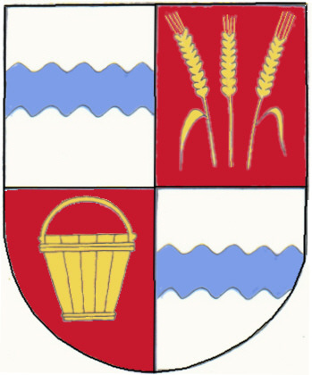 Wappen der Gemeinde Leimbach bei Neuerburg, Deutschland; Wappenbeschreibung: "Geviert, 1,4 silber, 2, 3 rot; 1, 4; blauer Wellenbalken, 2: drei goldene Ähren; 3: goldener Eimer"